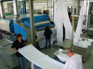 Betrieb der Textilpflege